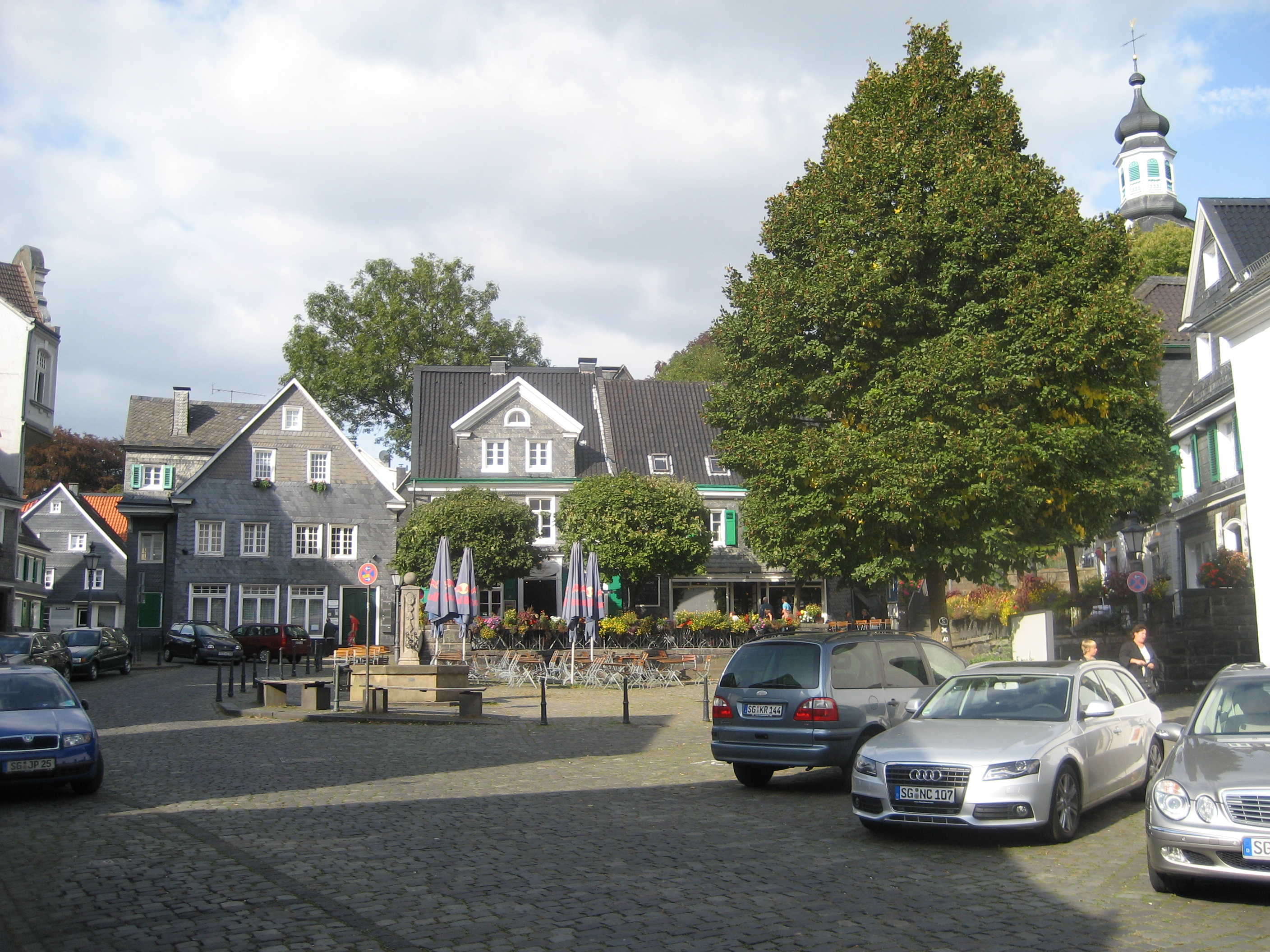 SG-Gräfrath: Blick Rtg Kaffeehaus mit Kirche